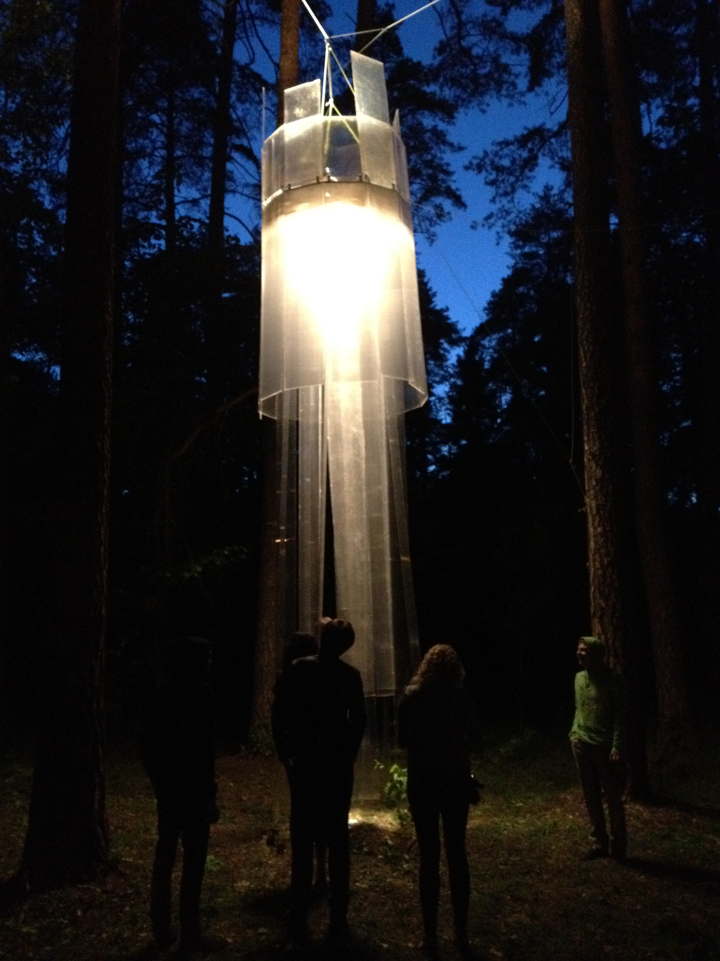 Башня Torre Trémula по проекту архитектора Лоренсо Фернандеса-Ордоньеса